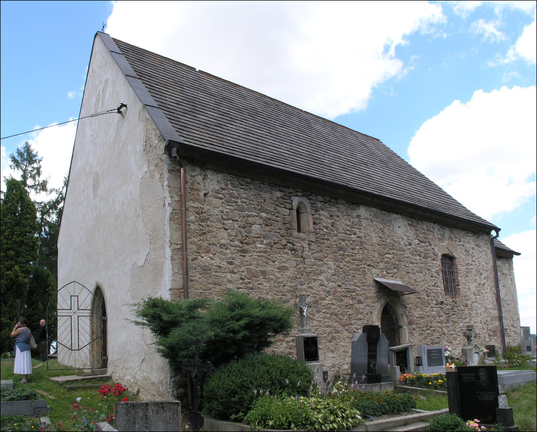 Kostel sv. Jiří (Řečice, okres Pelhřimov)